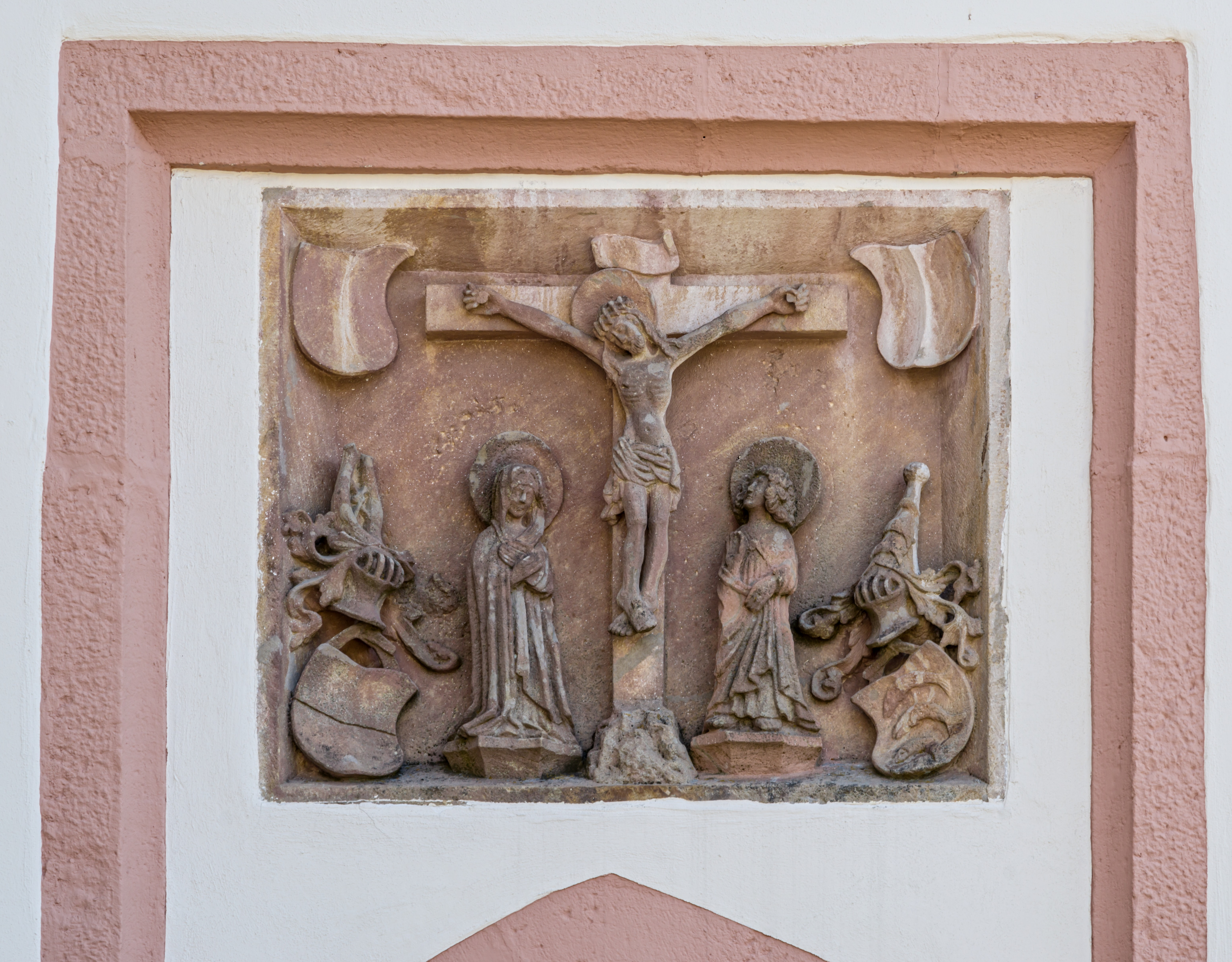 Bilder aus Oberried Relief am Turm